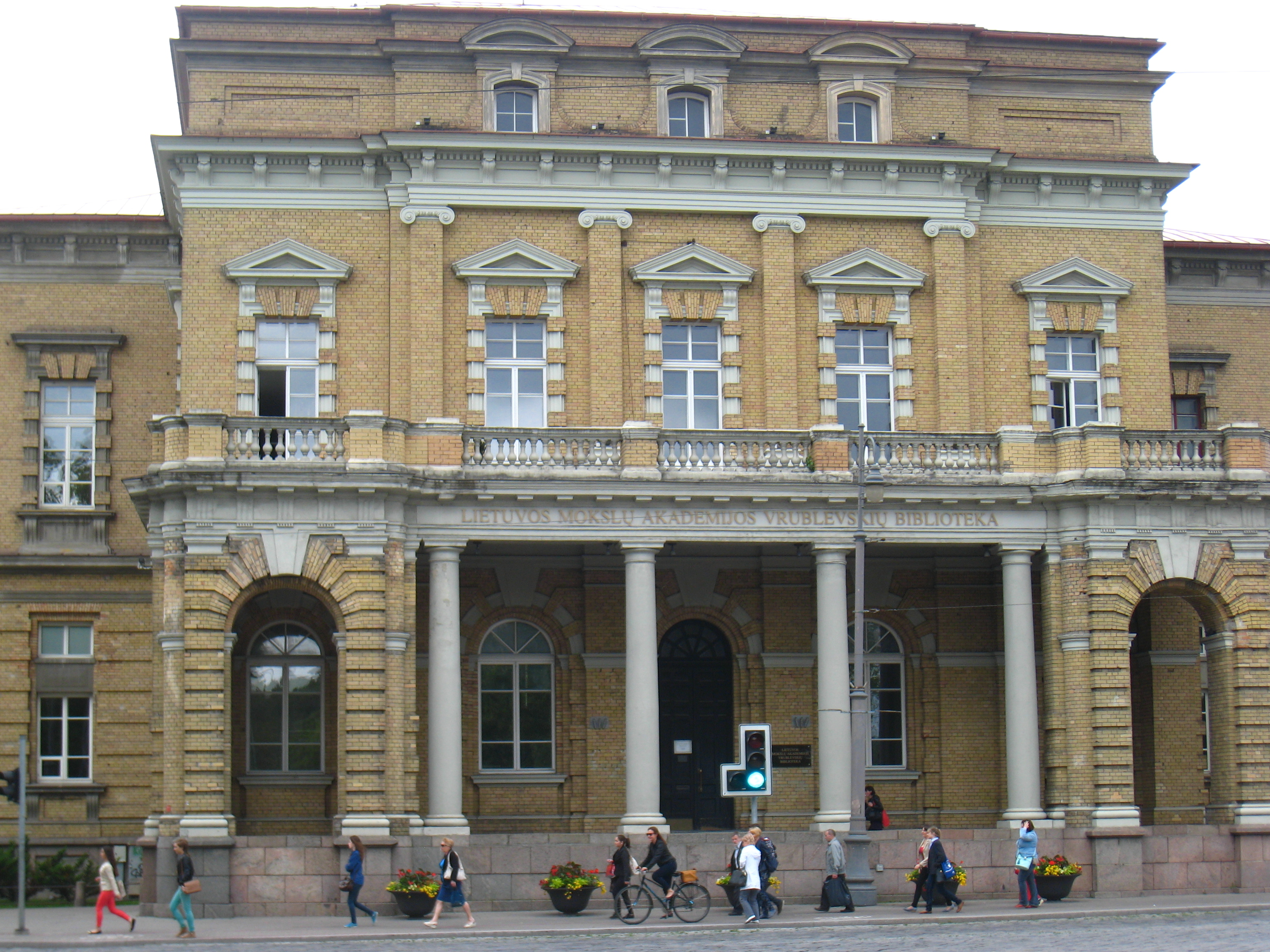 Žygimantų g. 1, Vilnius